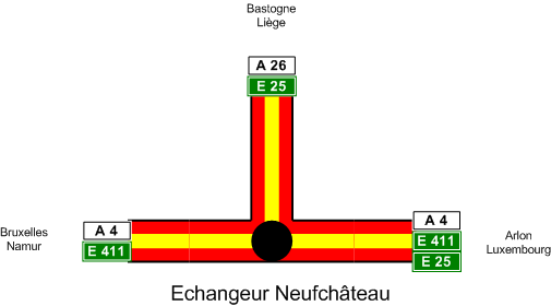 Schéma de l'échangeur Neufchâteau